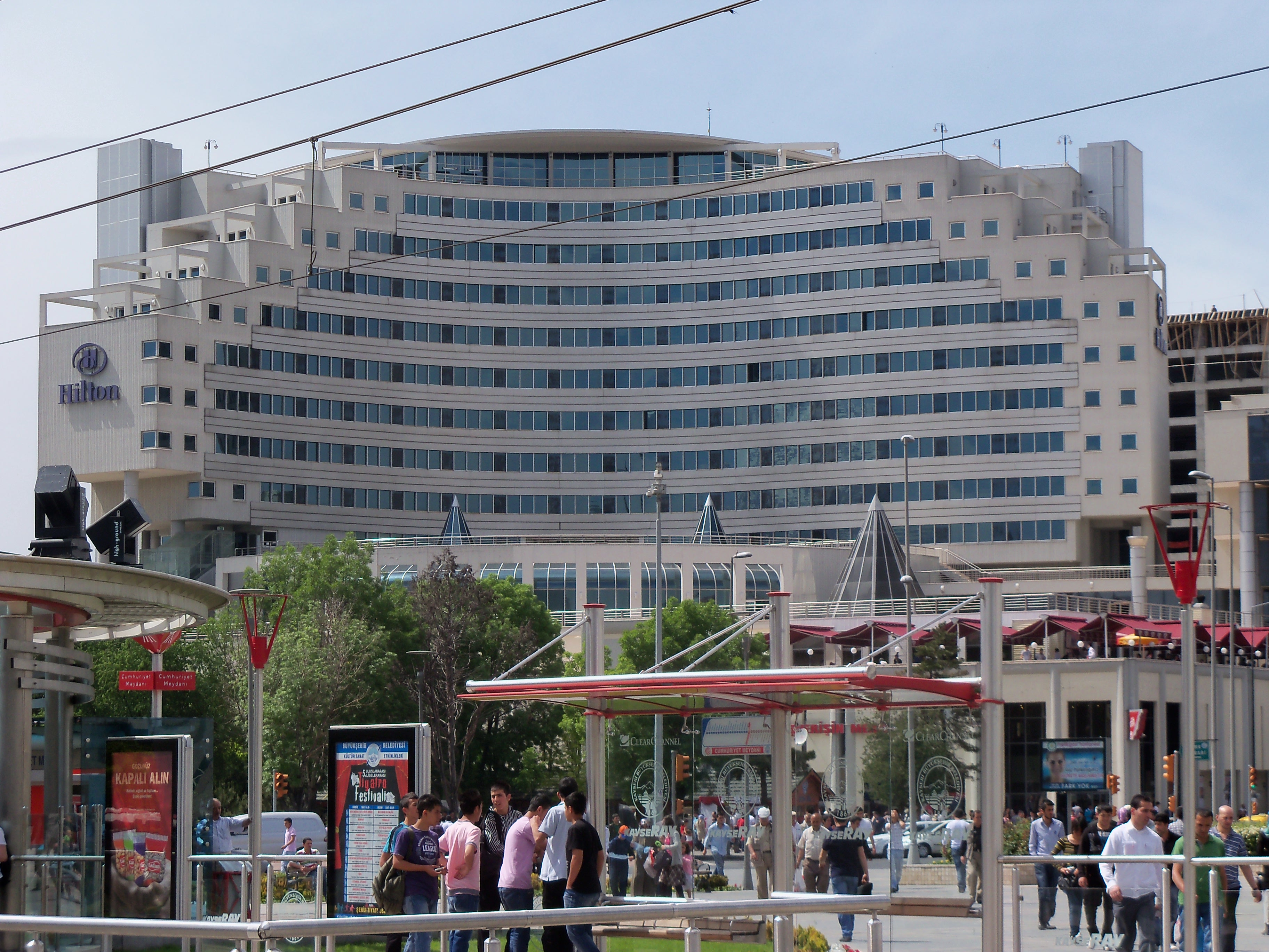 Hilton